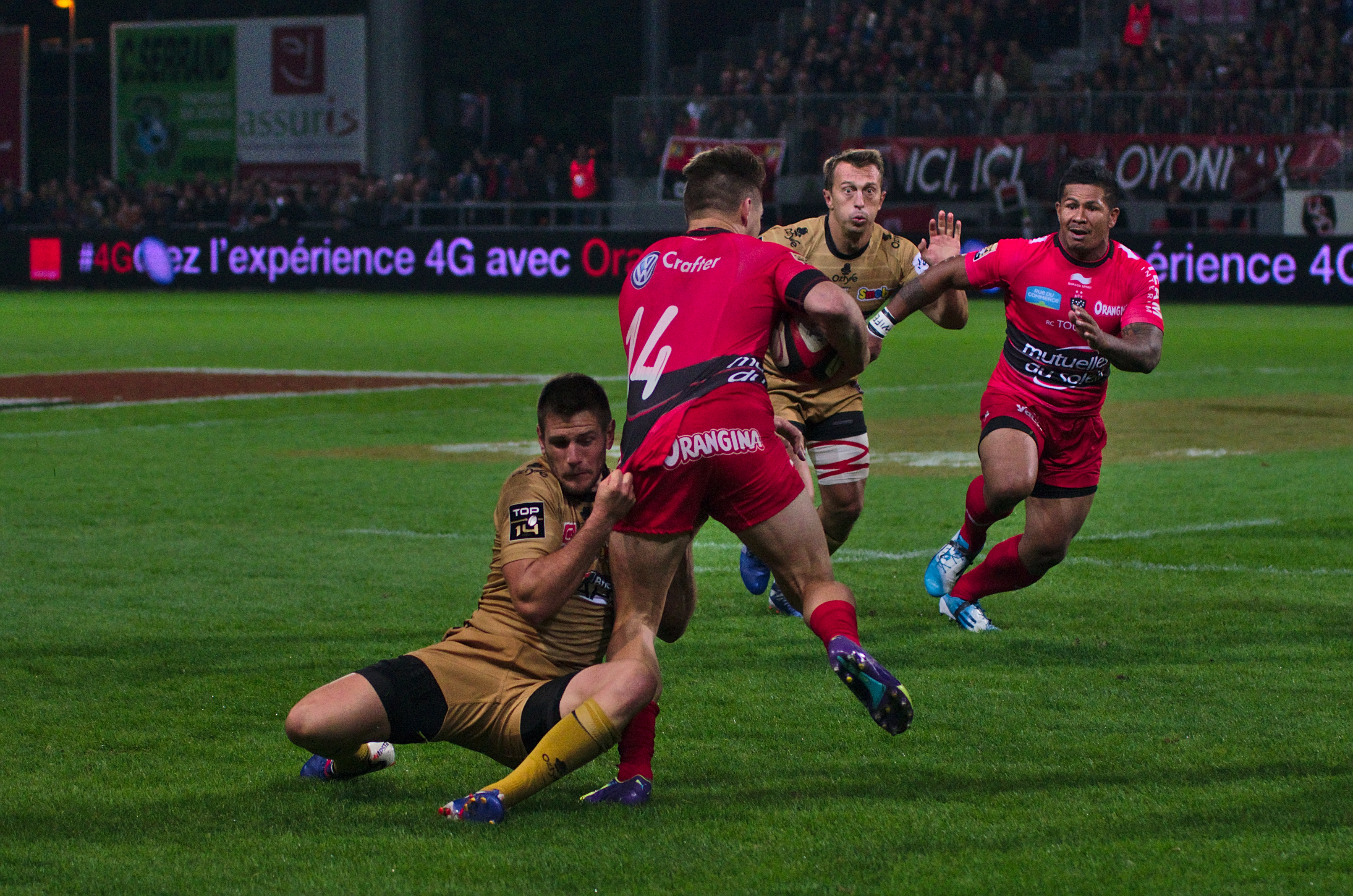 USO-RCT - 20141003 - Plaquage de Florian Denos sur James O'Connor - Jean-François Coux et David Smith en arrière plan